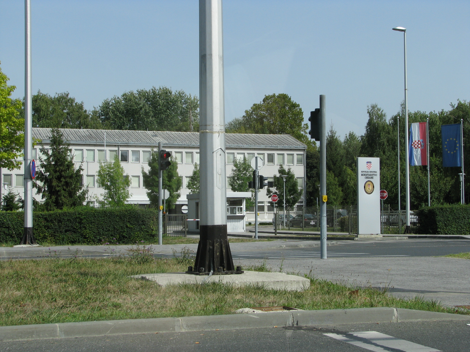 Ulaz u kompleks Ministarstva obrane Republike Hrvatske, novo sjedište u Sarajevskoj ulici u Zagrebu